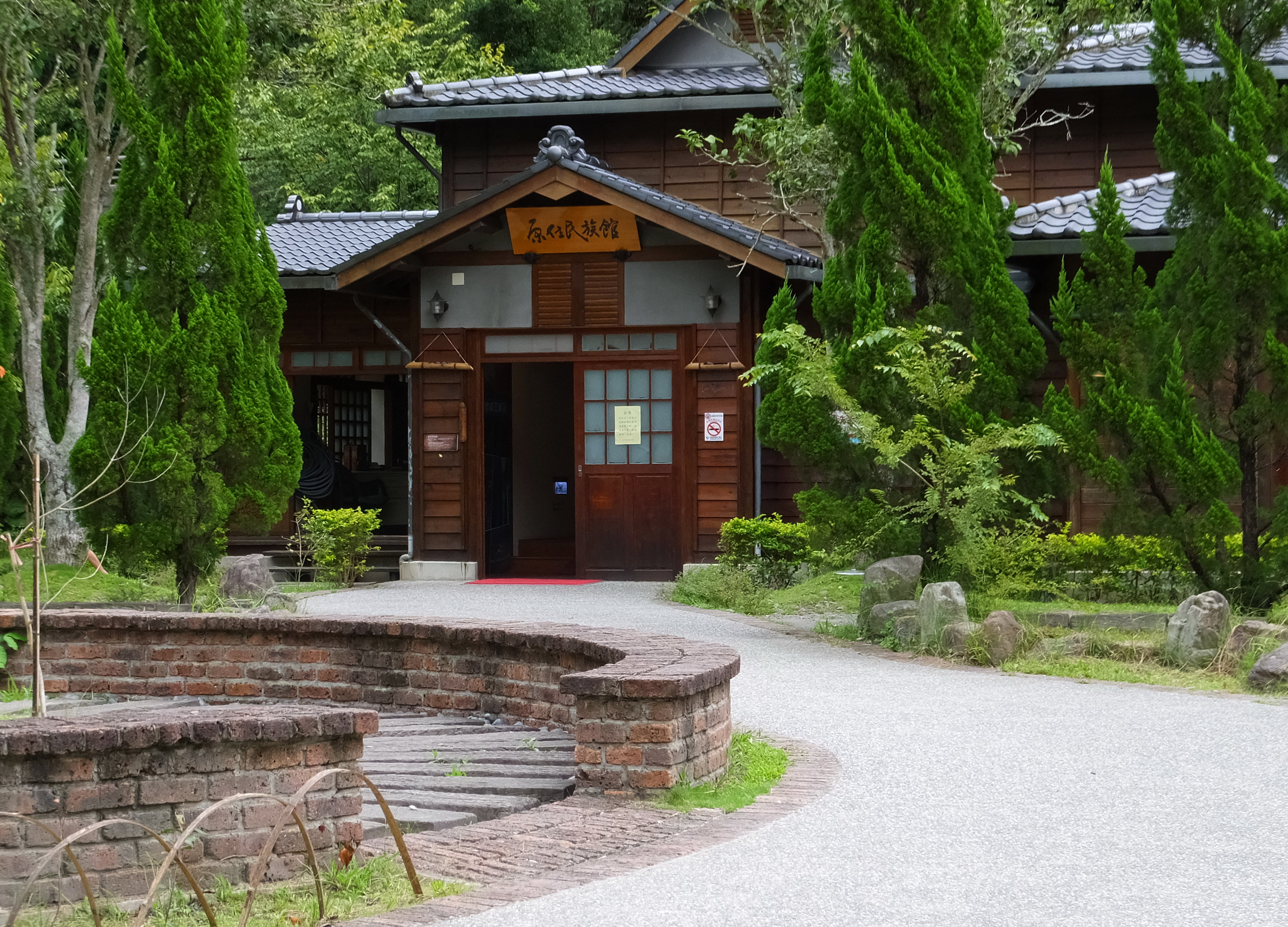 原住民族館 Indigenous People Museum